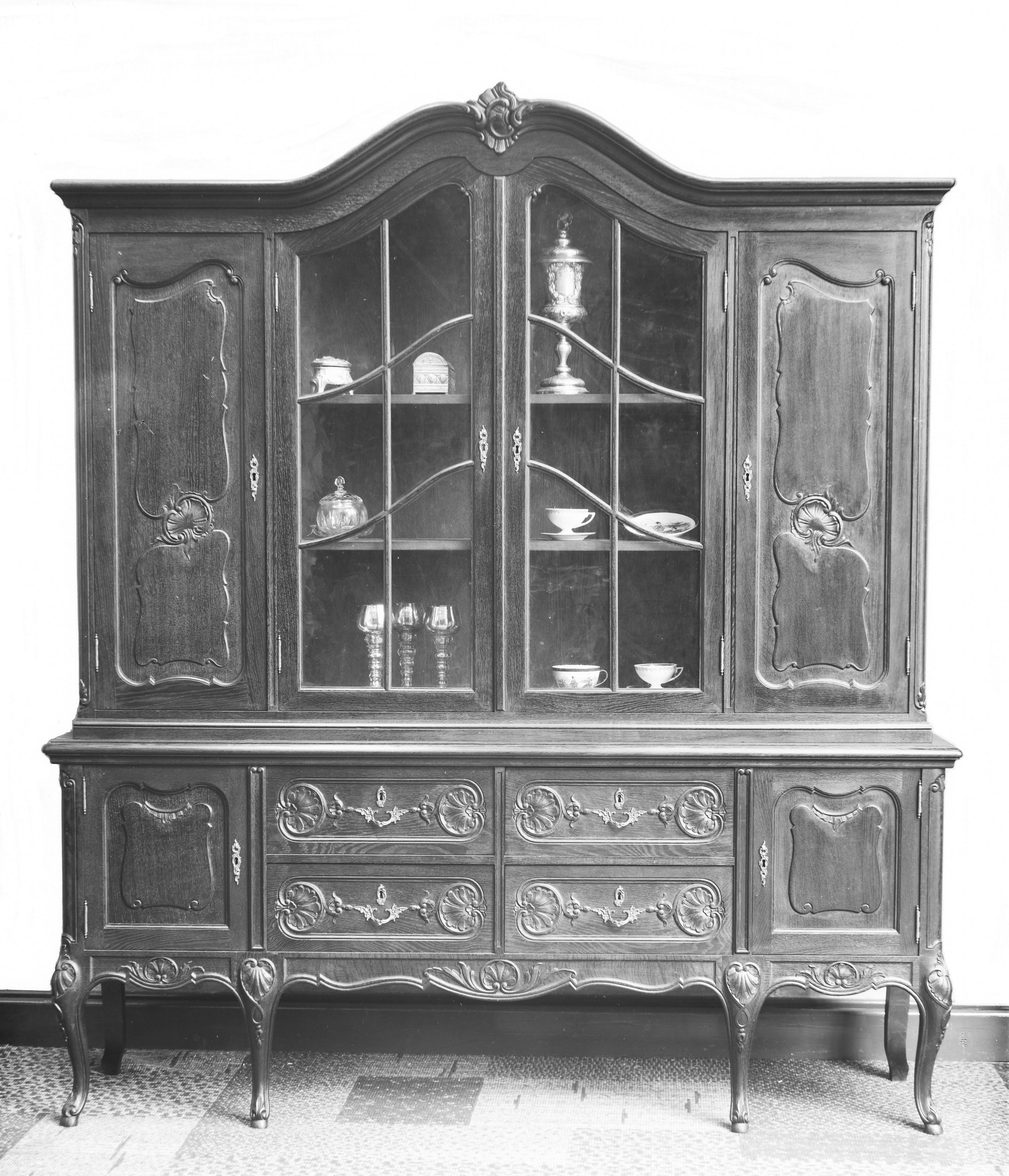 Kredenzschrank Nr. 406, 175 cm, Stil Louis XV‚ Kunsttischlerei Anton Spilker, Steinheim/Westfalen